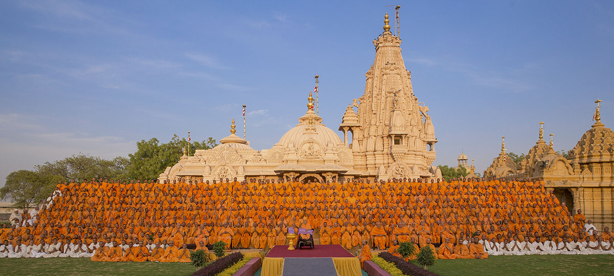 BAPS sadhus with Pramukh Swami Maharaj in Sarangpur, Gujarat, India (2015)